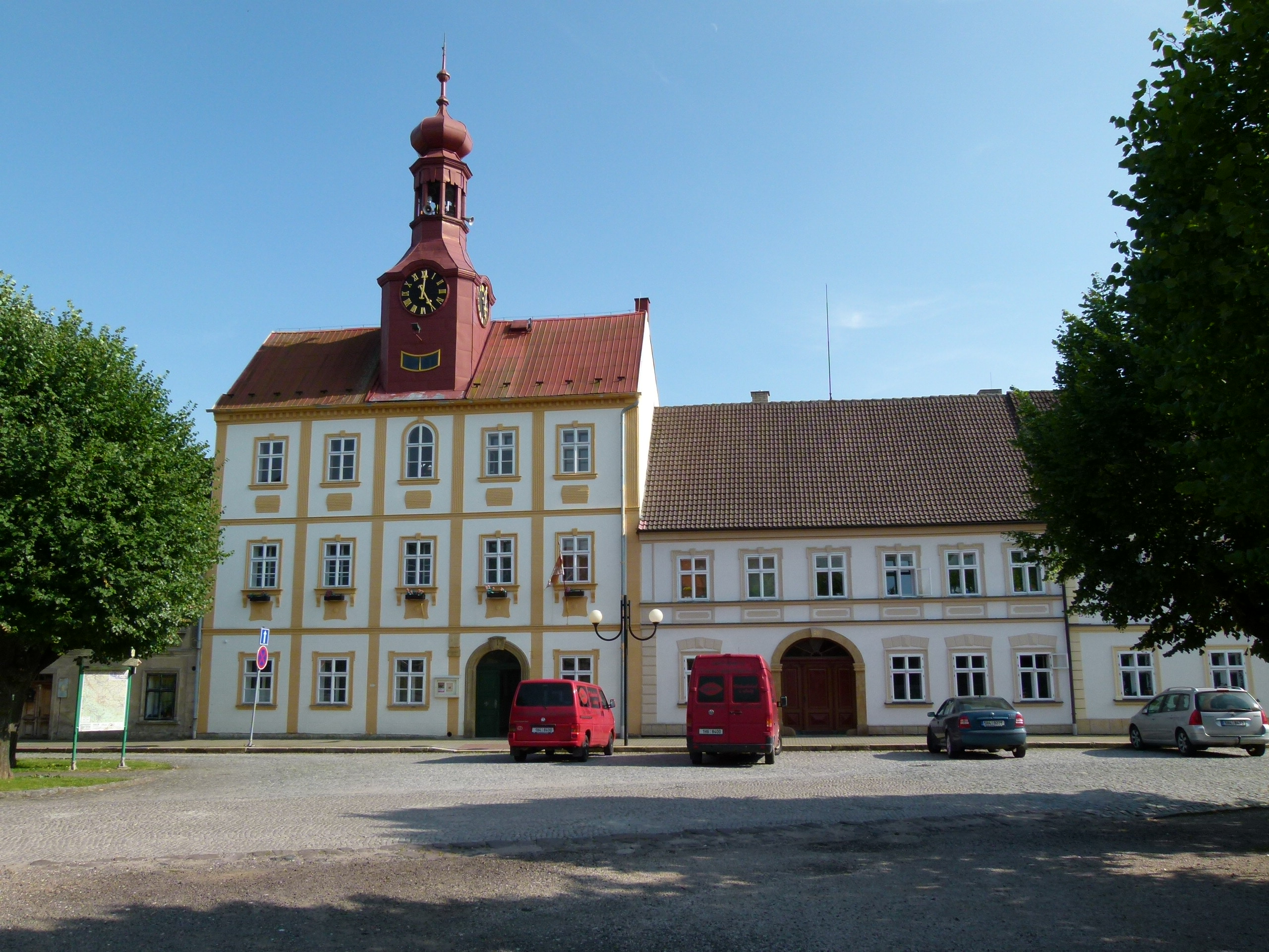 Radnice (Železnice), náměstí Svobody 1, Železnice